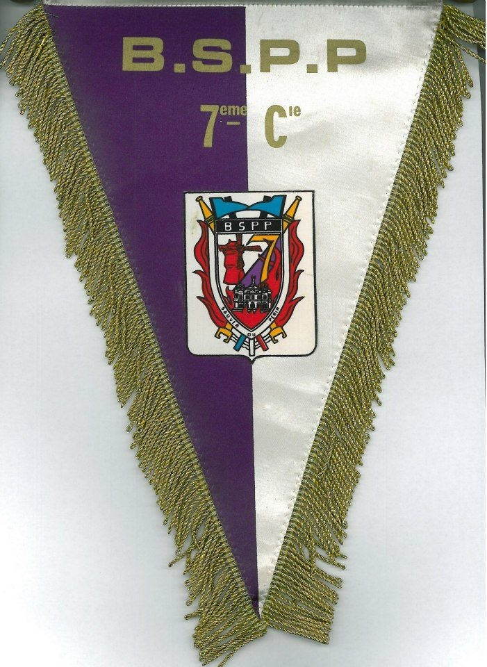 Fanion de la 7ème compagnie de la BSPP